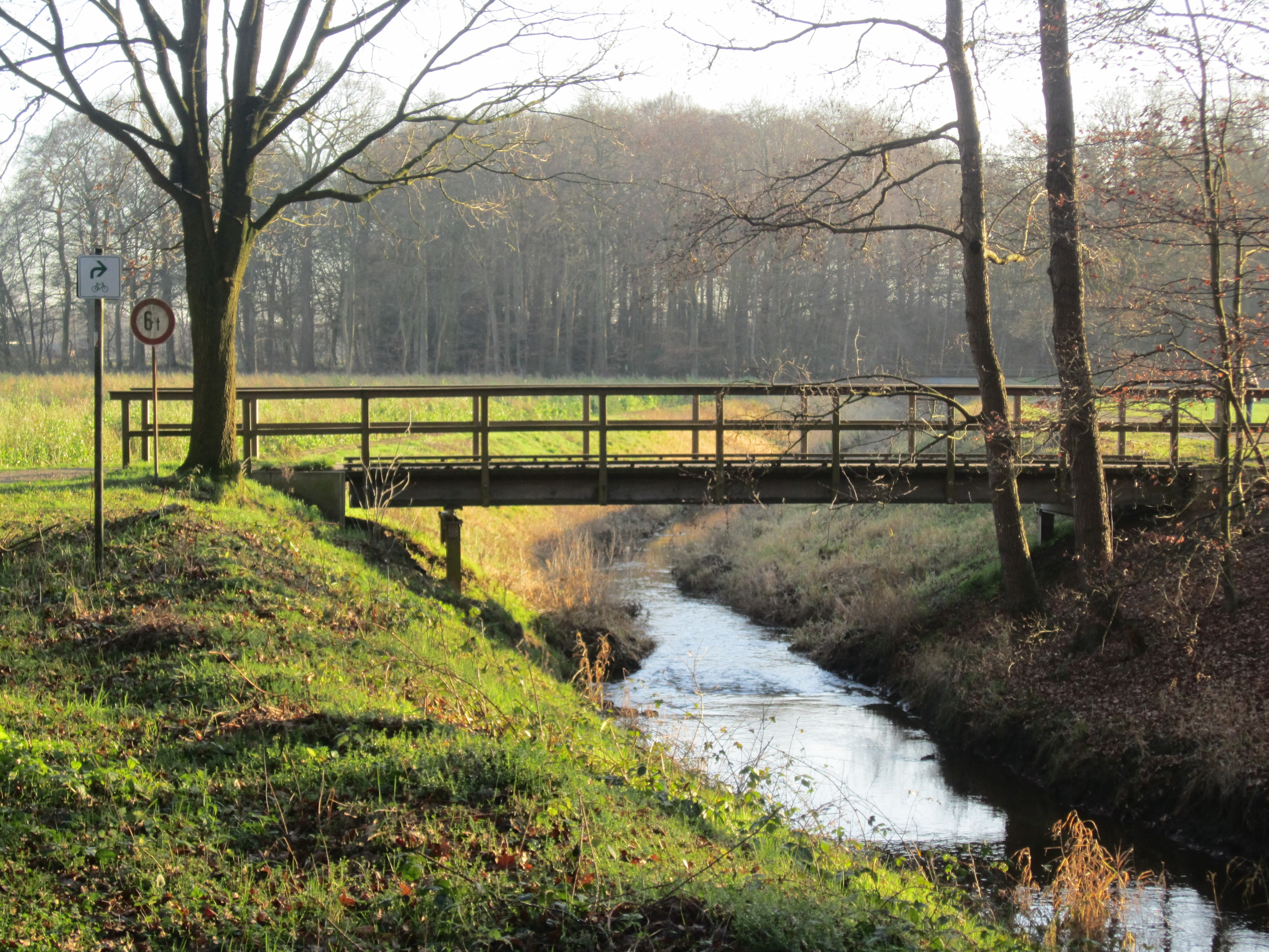 Beliebte Wanderstrecke vom Parkplatz an der Vechtaer Straße im Südosten von Bakum entlang dem Spredaer Bach. Im Hintergrund befindet sich der Wald des Guts Daren.